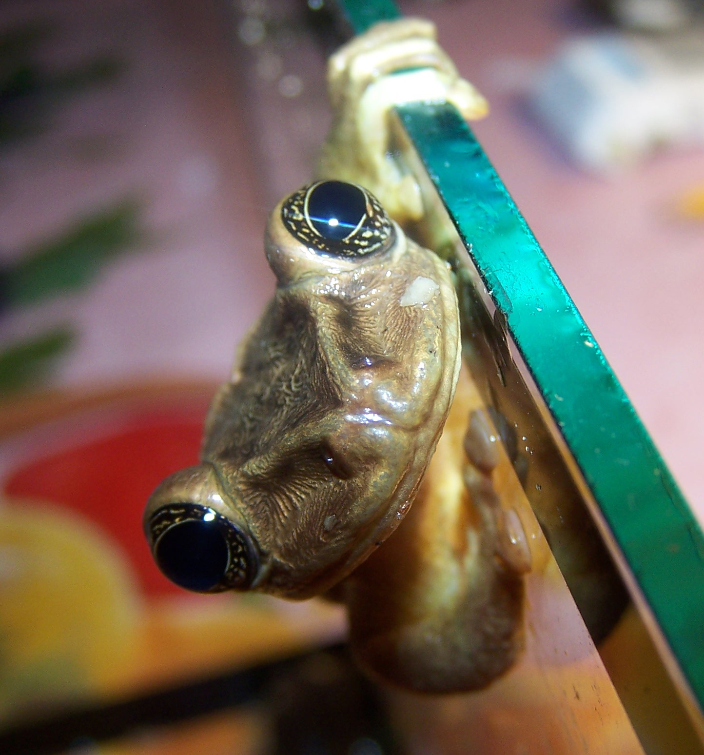 Trachycephalus jordani trapped in Ukraine.